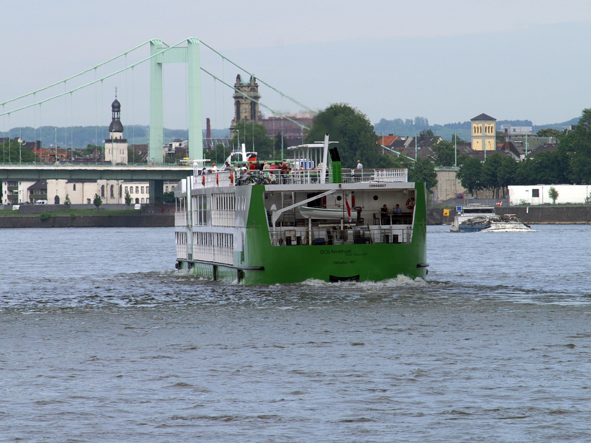 Flusskreuzfahrtschiff DCS Amethyst auf Fahrt in Köln.